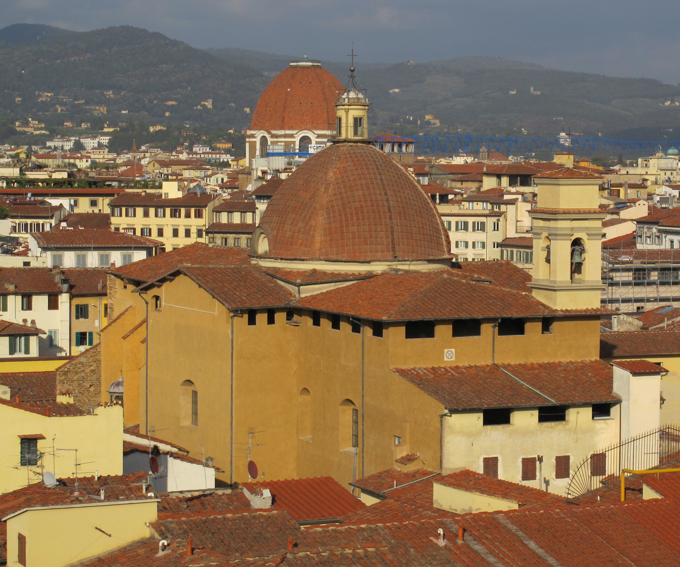 Hotel excelsior, terrazza, vista san paolino